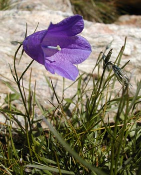 Campanula scheuchzeri campanule photo anthere GFDL avec autorisation de l'auteur